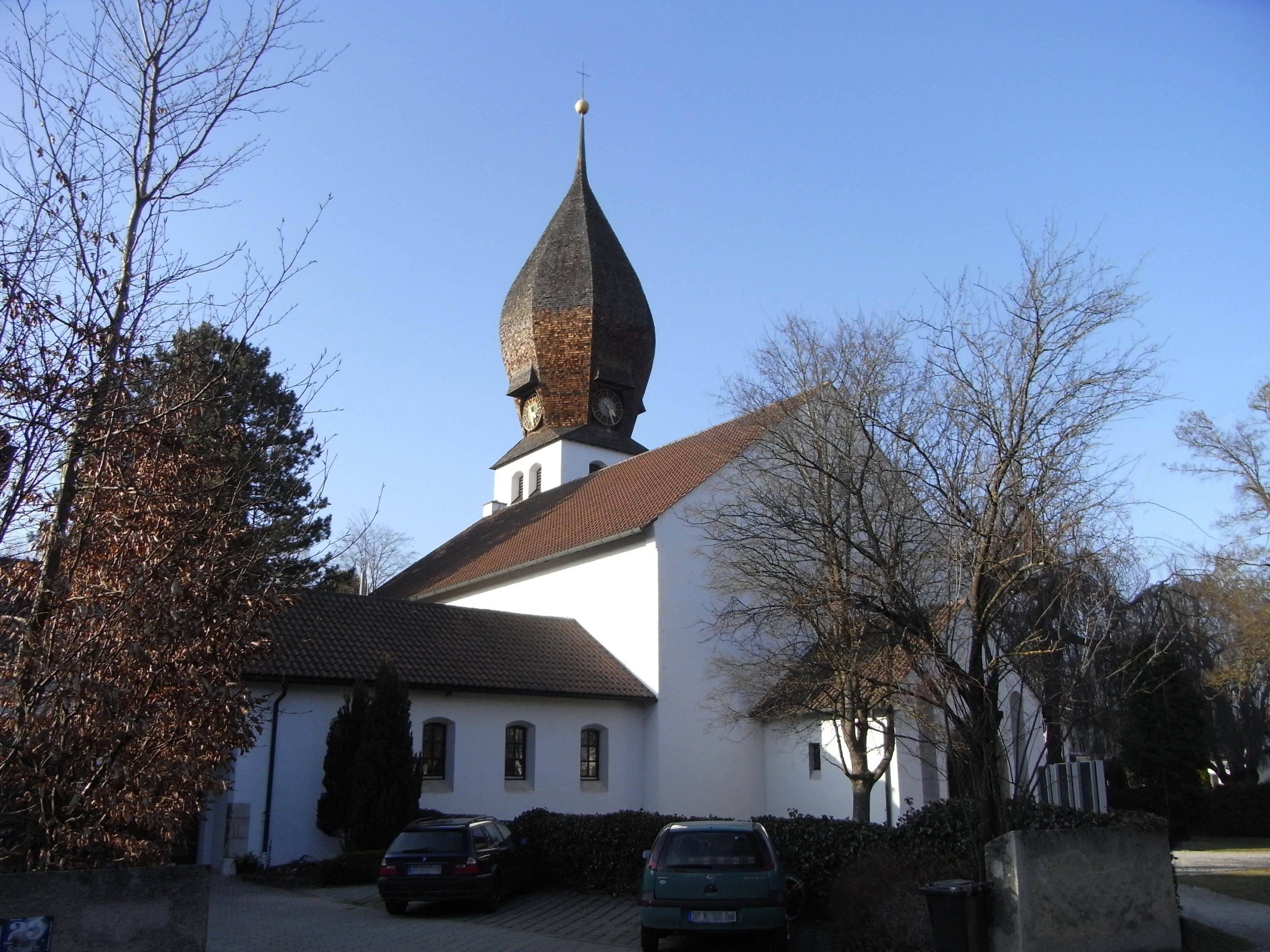 Weßling, Christkönigskirche von Süden gesehen.